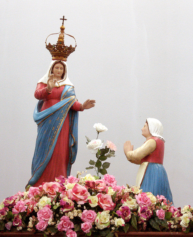 Nossa Senhora de Caravaggio e a vidente Joaneta, obra de Pietro Stangherlin. Santuário de Caravaggio, Farroupilha, Brasil